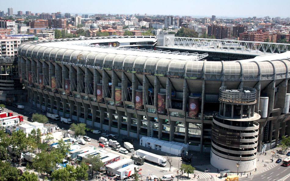 Estadio Santiago Bérnabeu (Mayo 2010)